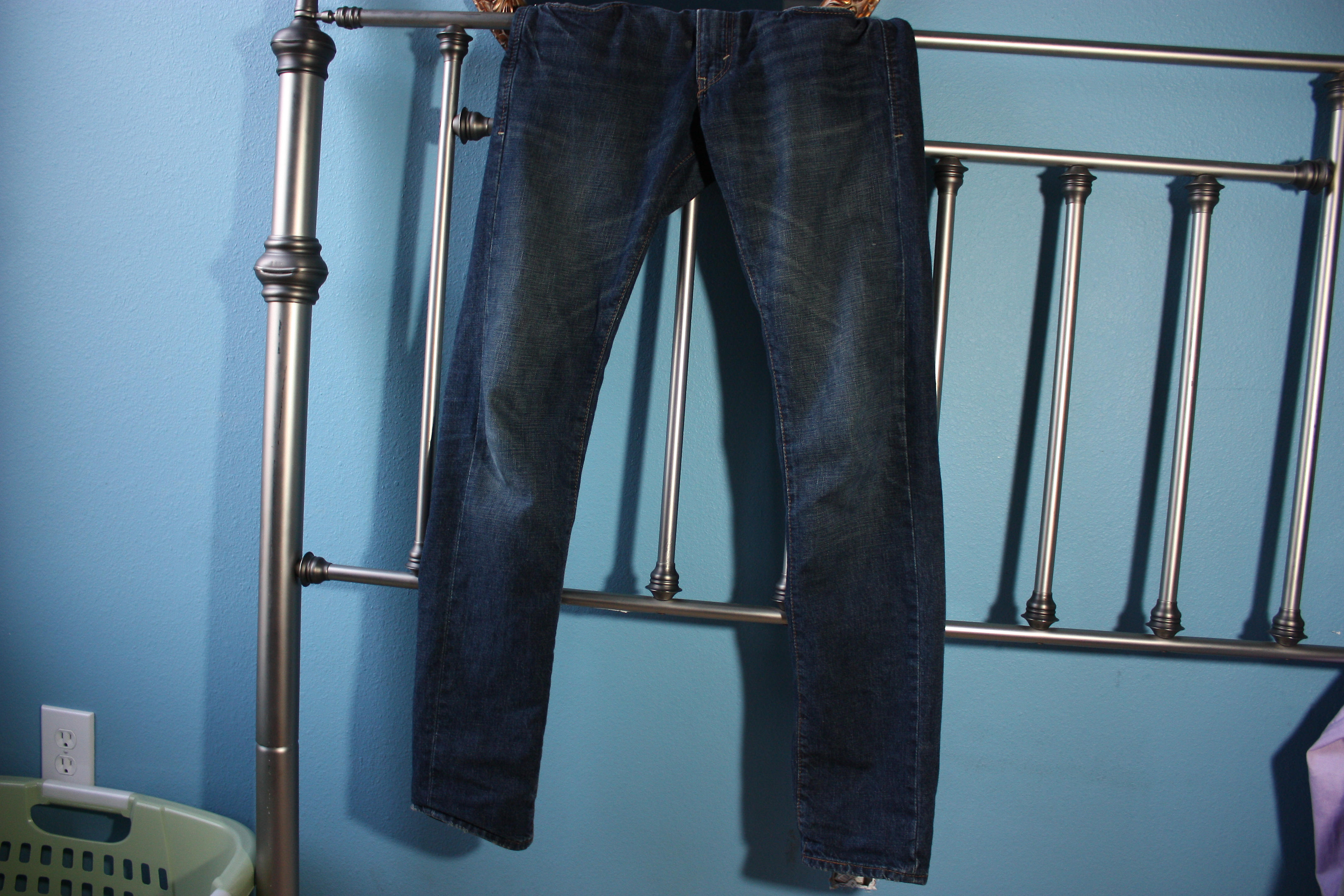 Jeans